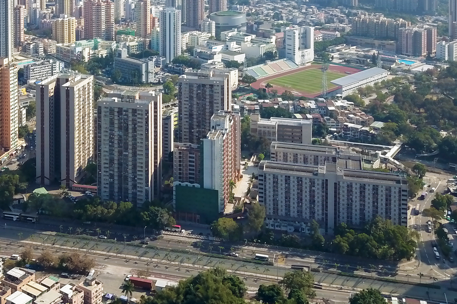 Shui Pin Wai Estate